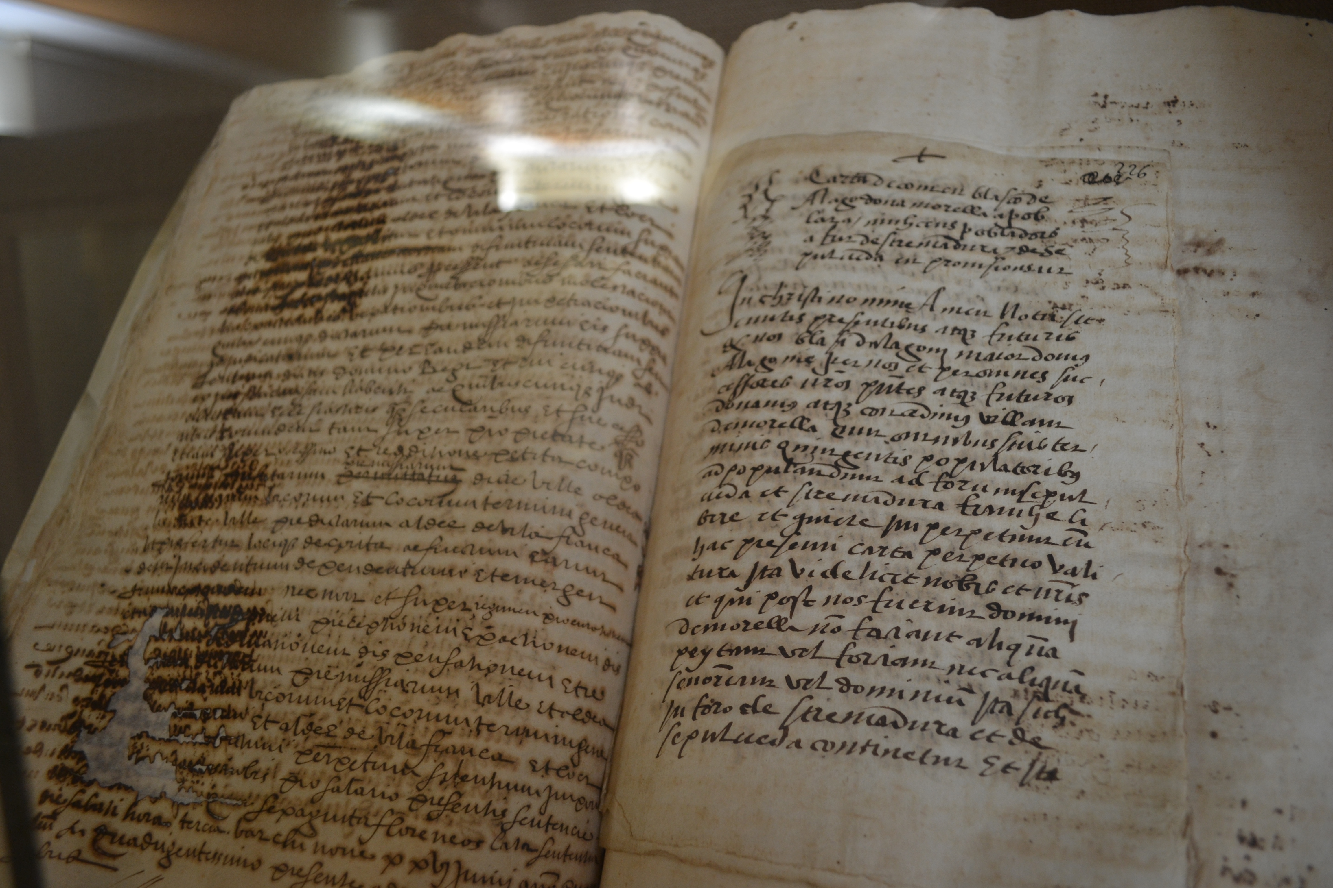 Balasc d'Alagón atorga carta de poblament al castell i vila de Morella, a fur de Sepúlveda i Extremadura, per a 500 pobladors (17 de abril de 1233). ARV: Reial Cancelleria, registre 698, fol. 226 (còpia simple del segle XVII). Arxiu del Regne de València.